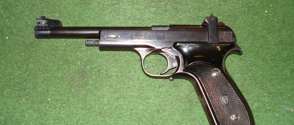 Margolin - zdjęcie Michał Sulczyński